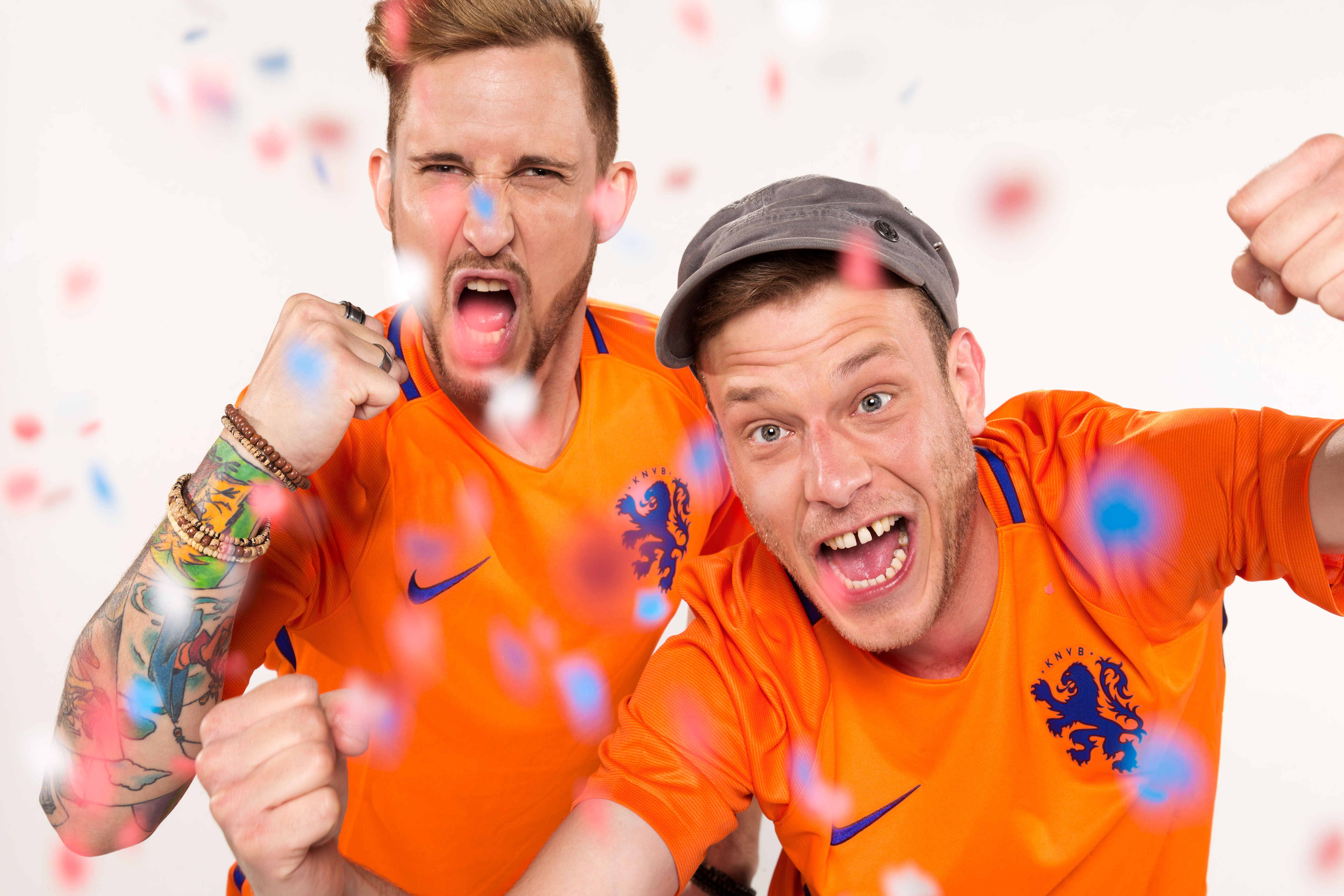 Pressefoto 257ers